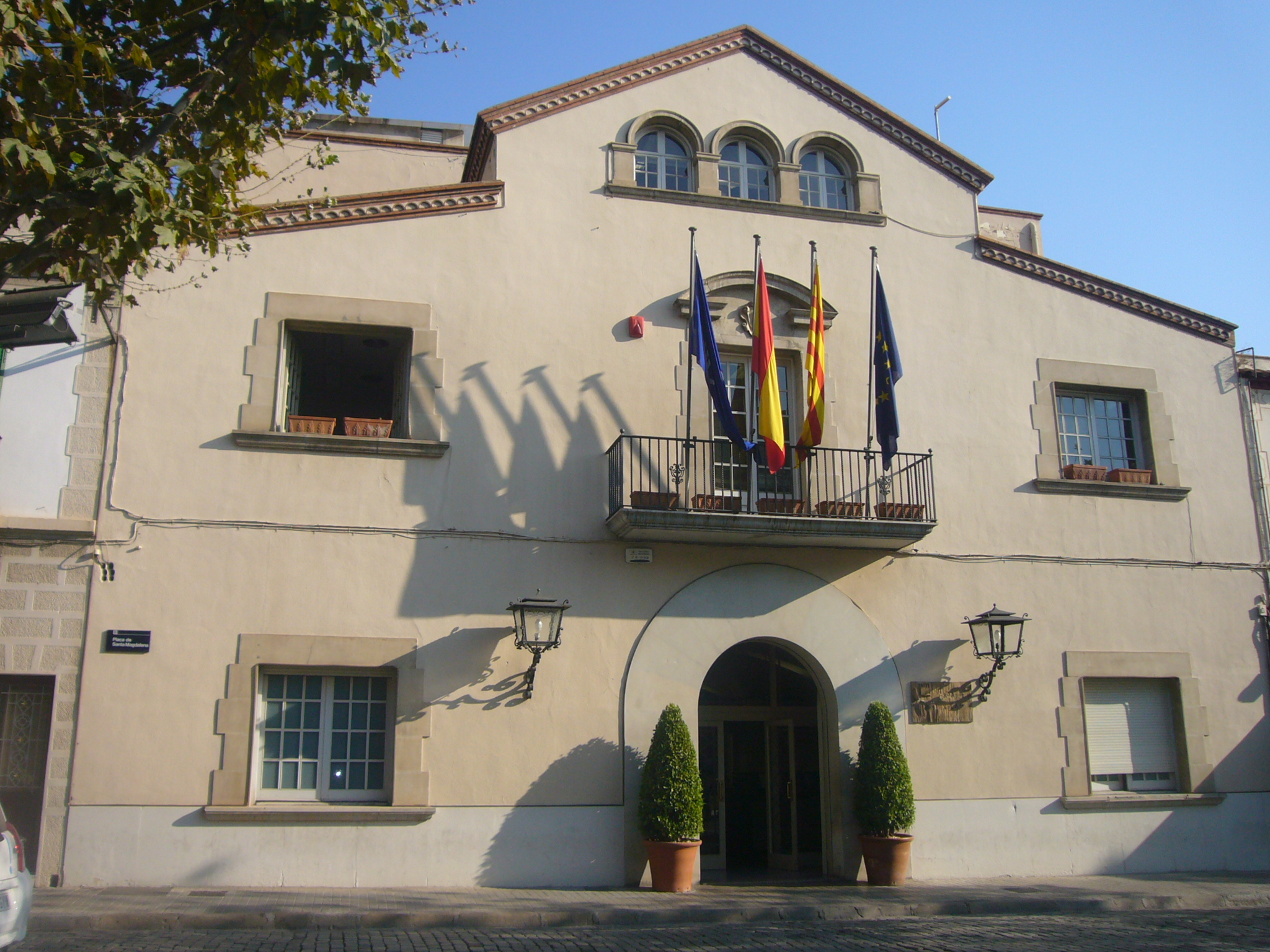 Ajuntament d'Esplugues de Llobregat